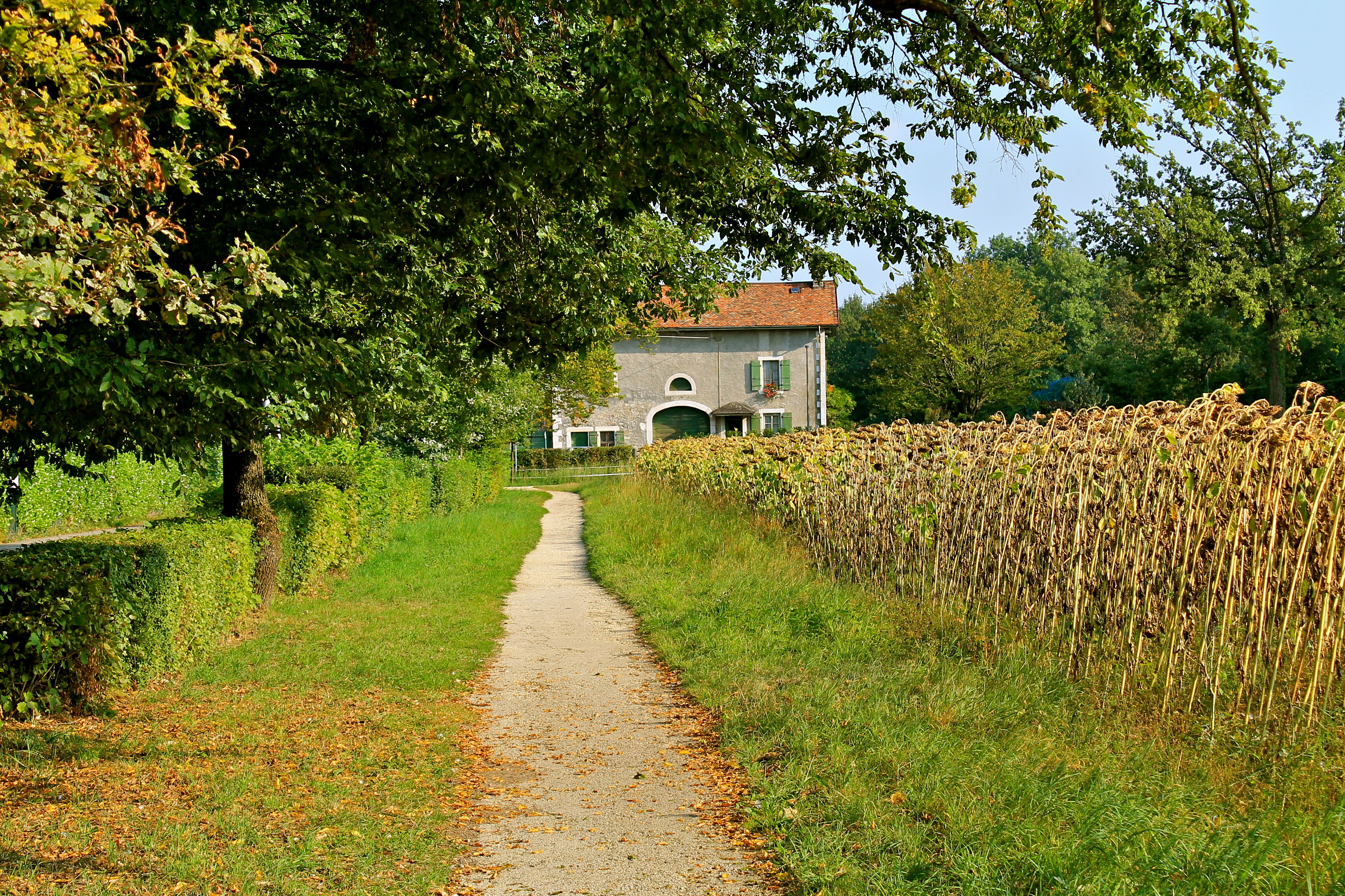 Chemin de baguenaude près du "Grand-Champ", dans la campagne genevoise.